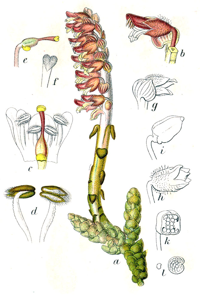 Lathraea squamaria L. Original Caption Schuppenwurz, Lathraea squamaria